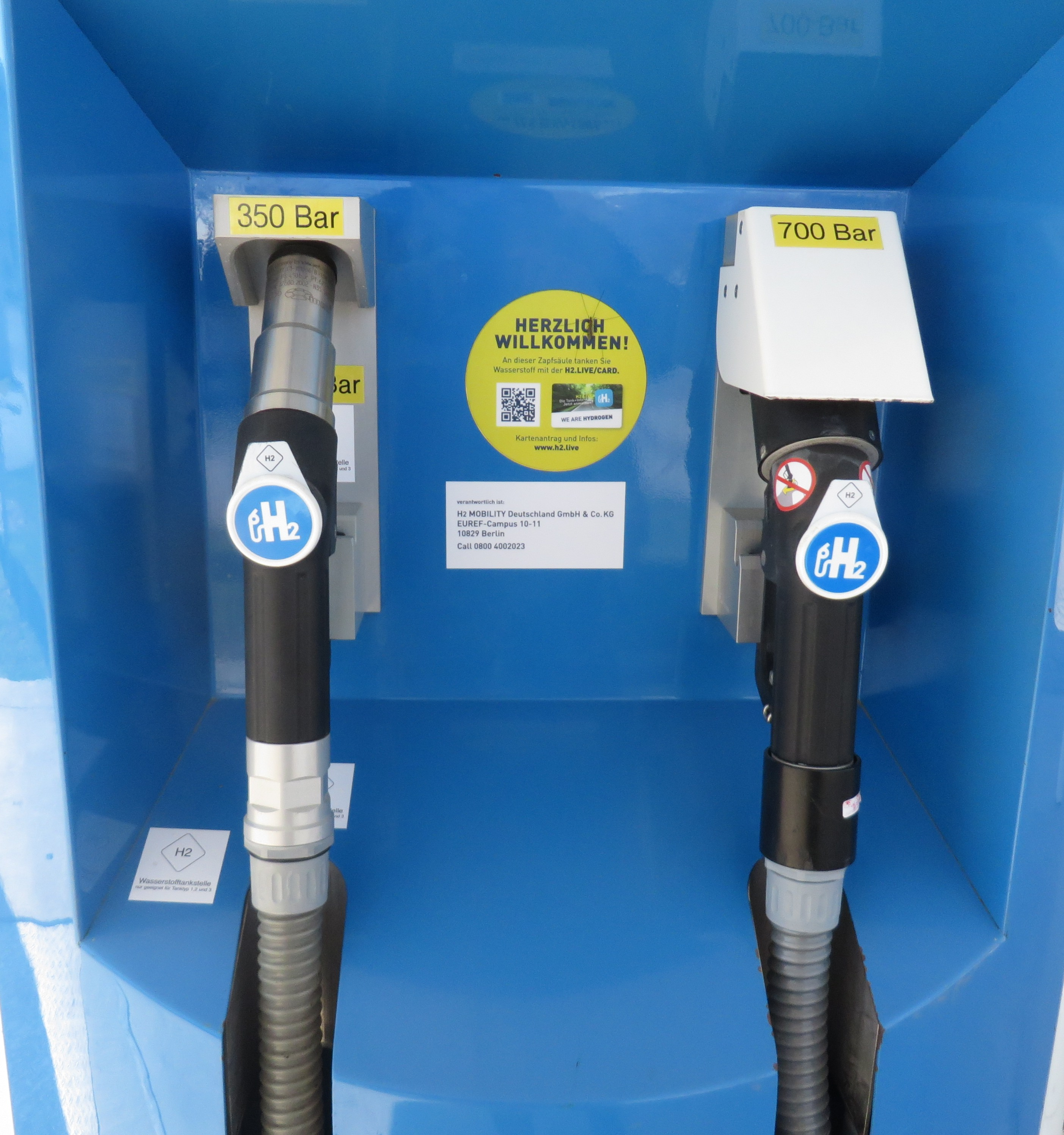 H2-Tankstelle in Offenbach-Kaiserlei, Hessen, Deutschland, Zapfhähne